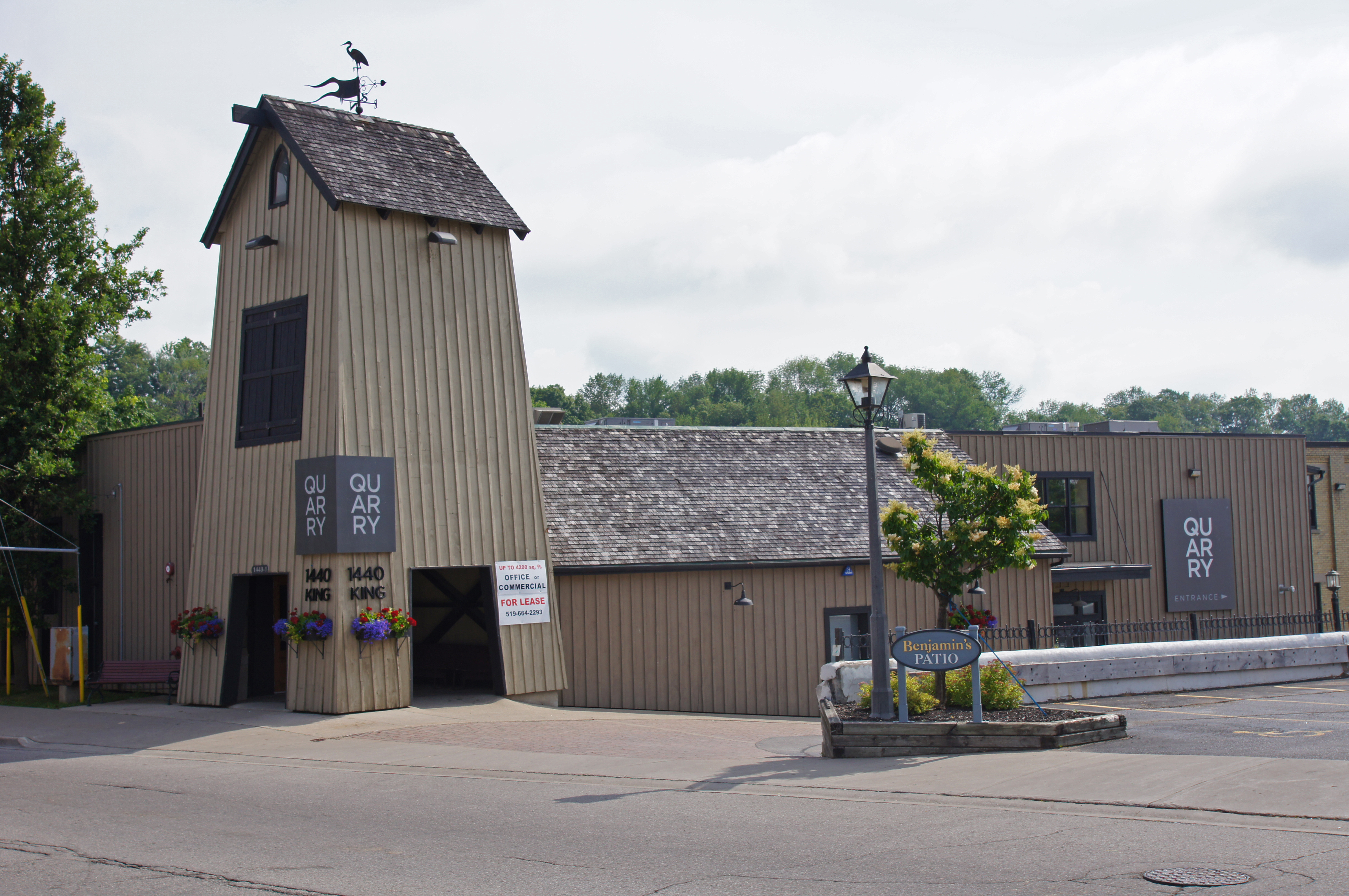 2011-07-06 07-08 Kanada, Ontario 002 St. Jacobs.jpg